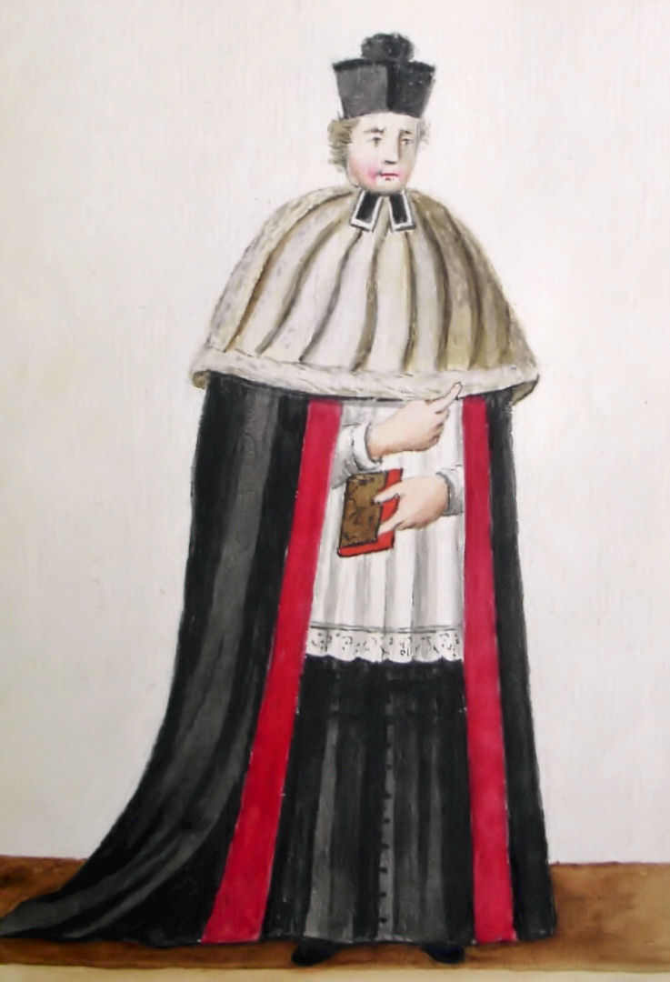 Manuscript:,Ludovicus Clercq and Leo Vlaming, ghent 1812, Waerachtige verbeeldingen van alle de cleedingen der religieuse ordens